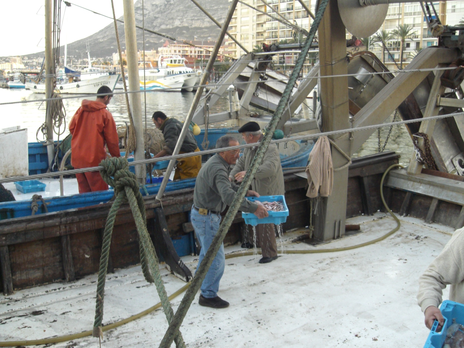 Pescadores en el puerto de Denia Fishers working at the end of the day Port of Denia (Alicante) Dénia Denia Dénia Denia